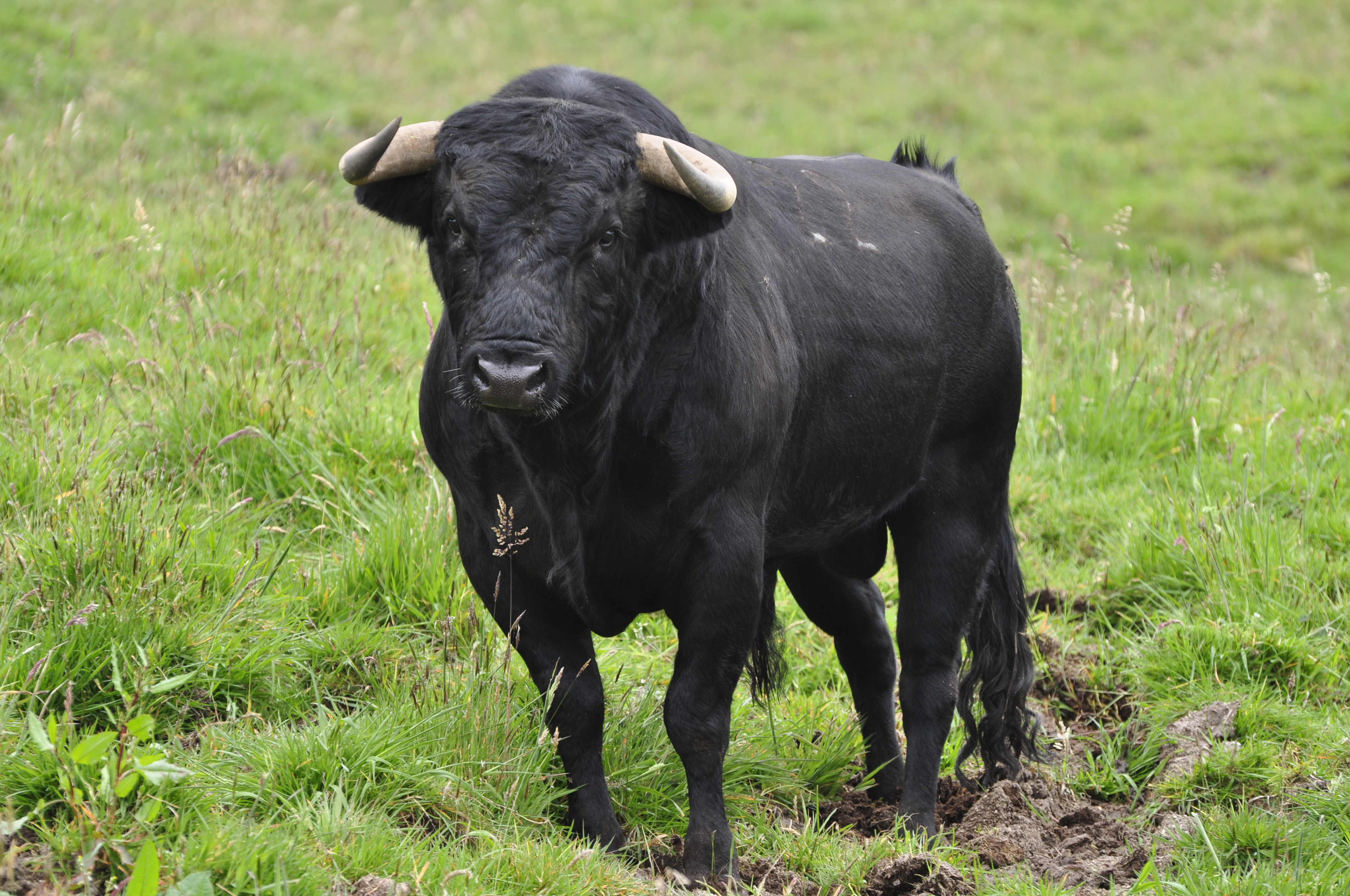 Es un toro de la ganaderia Ernesto Gutierrez en la finca la Esperanza, Caldas. La foto fue tomada en el 2011.